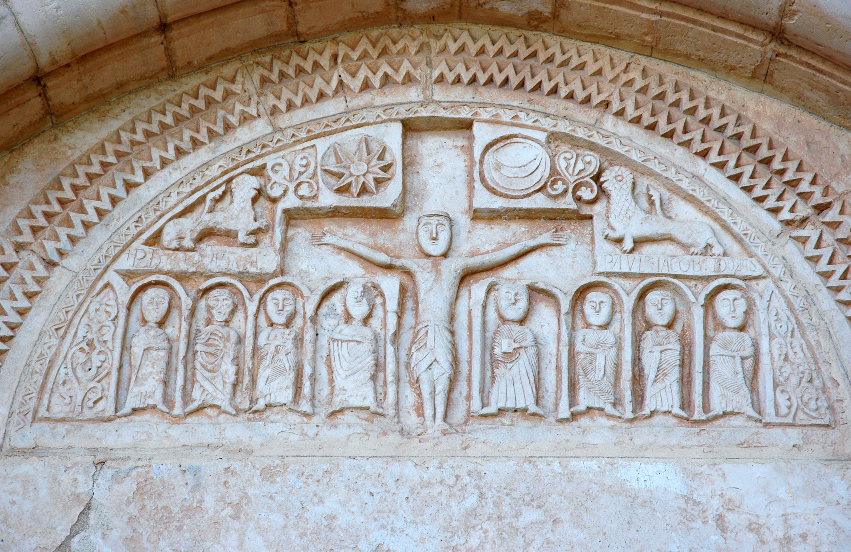 Siurana - Església de Santa Maria